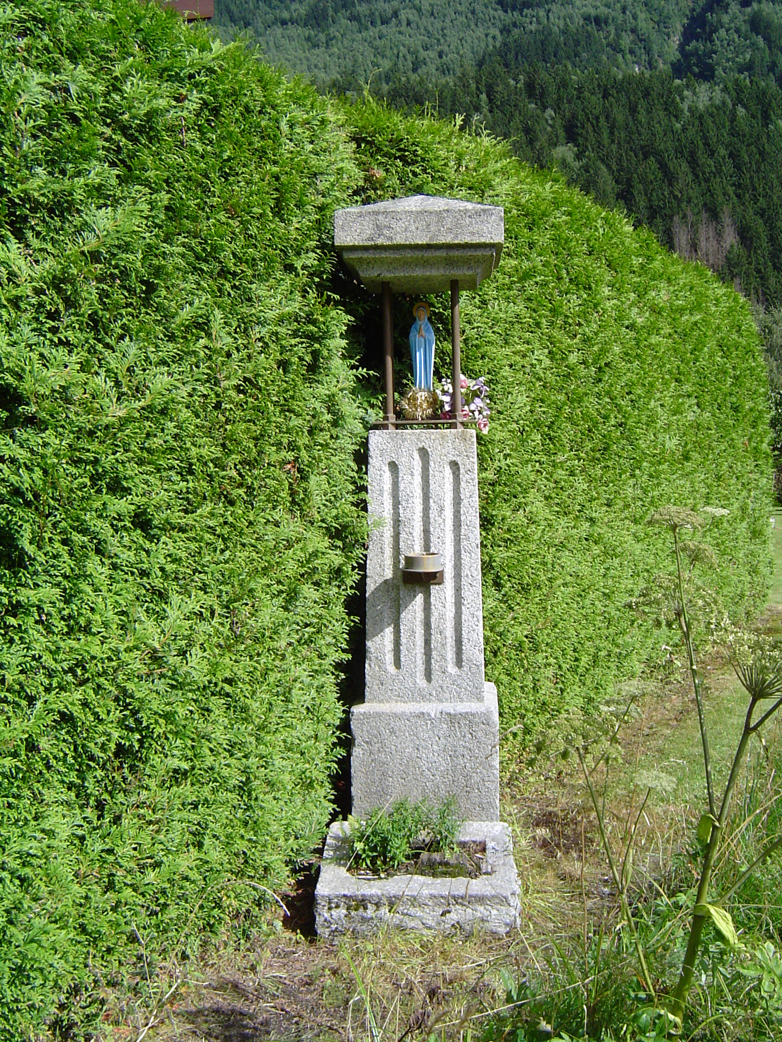 Photos prises dans la commune de Chamonix-Mont-Blanc